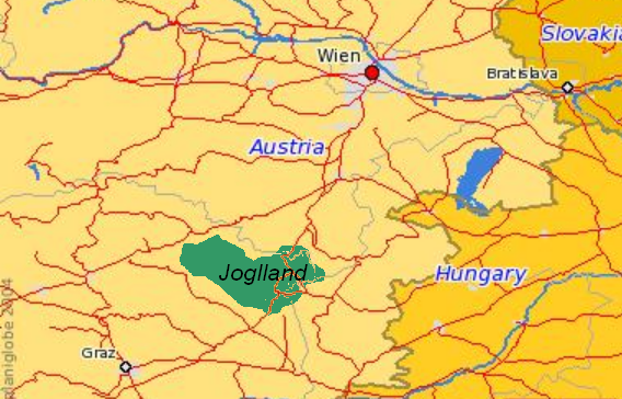 Joglland